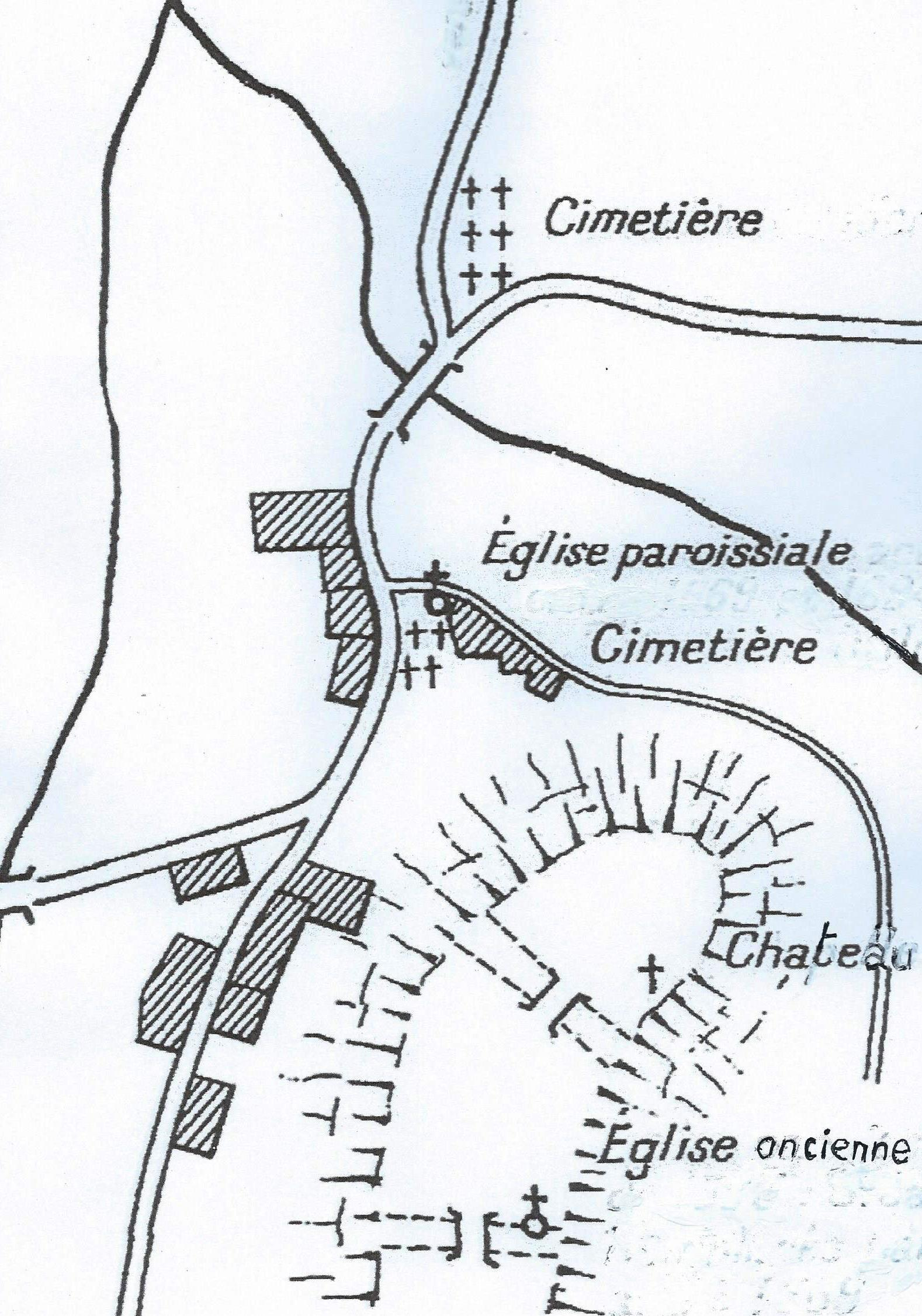 Ancien plan de Duesme (Côte-d'Or)